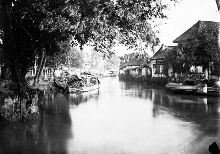 Foto. Album beslaat souvenir foto's van Java. Chinese wijk de Tjiliwong in Batavia